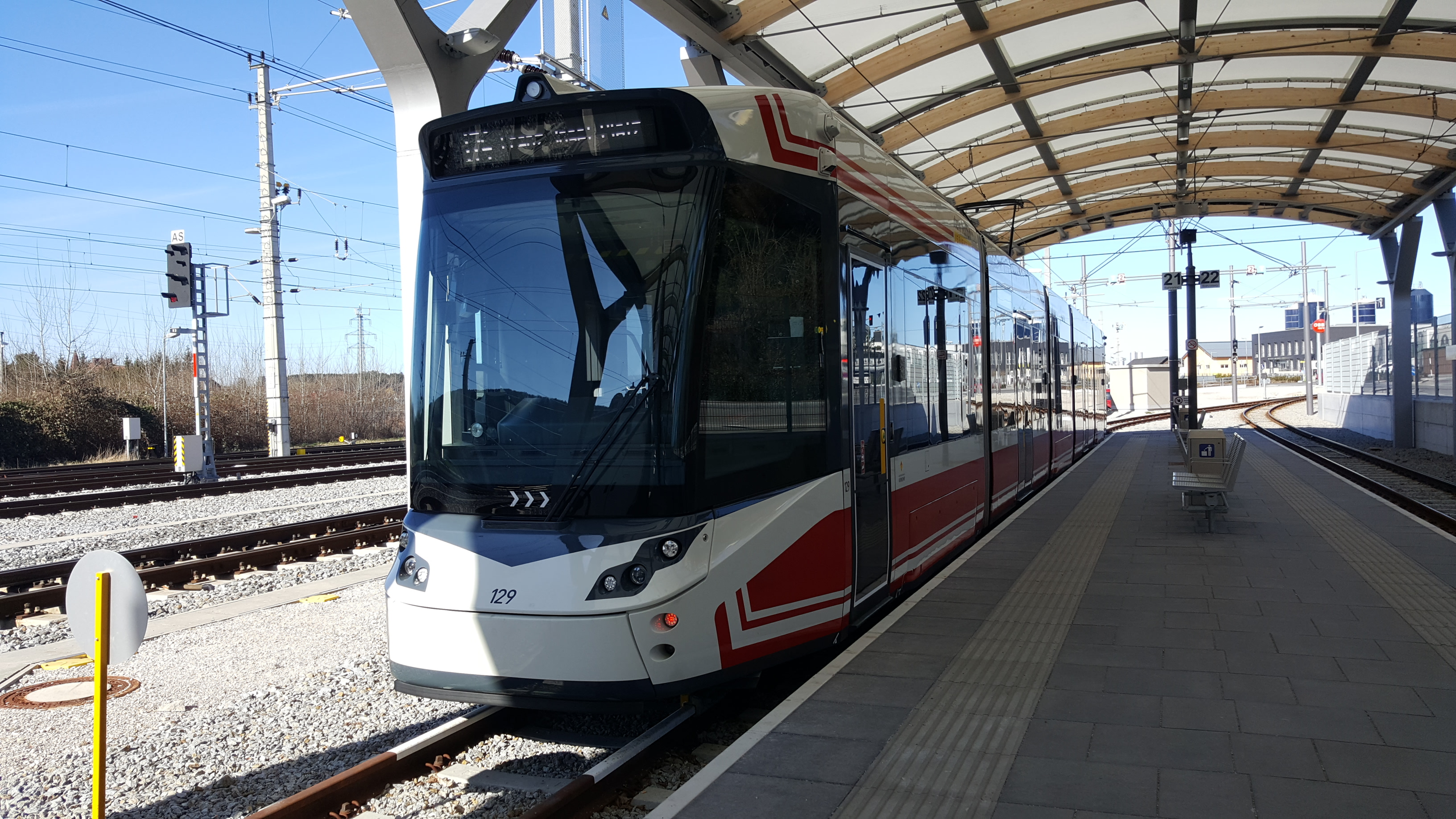 Stadt.Regio.Tram Gmunden Vorchdorf